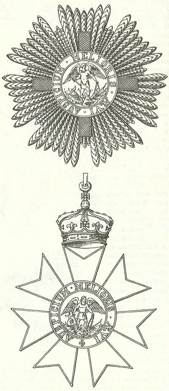 Scan van Blz. 105 en 107 van het boek "Handbuch der Ritter- und Verdienstorden " uitgegeven 1893 door Weber.Tekening van de in 1902 overleden Maximilian Gritzner. Robert Prummel 10 jul 2008 16:40 (CEST)